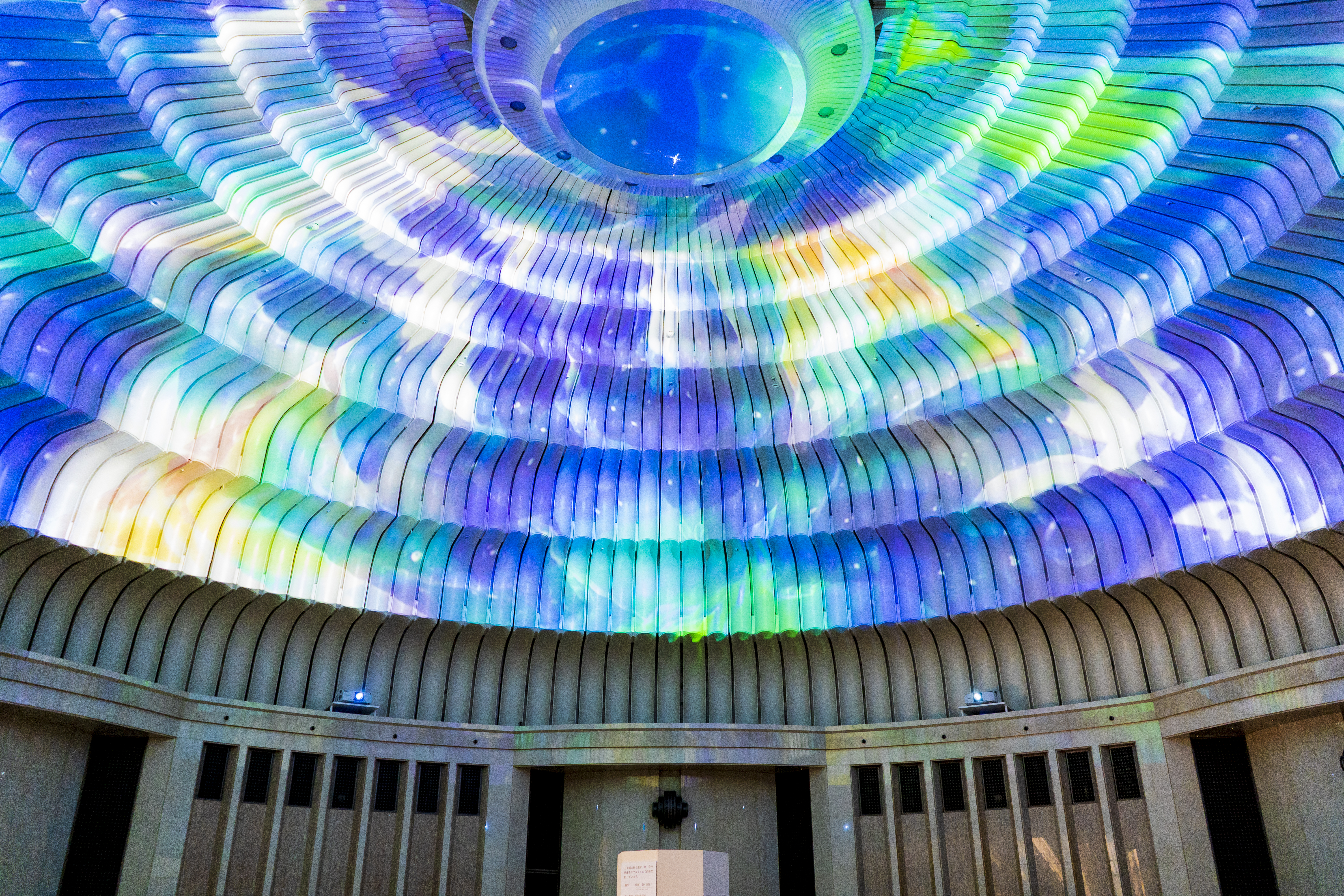 日本最大のマッピングされた万華鏡直径約20m、高さ約10mの巨大なドーム型の円形ホールでは、世界最大の万華鏡フェスティバル「ブリュースター・カレイドスコープ・ソサイエティ」において、日本人としてはじめて２年連続グランプリ（2005、2006）を獲得した依田満・百合子夫妻の万華鏡が映写されています。円形ドーム一面にマッピングされた万華鏡は日本最大です。この万華鏡のために作曲家・中村由利子氏が新たに制作した音楽と併せてお楽しみください。 壁はイタリア産の大理石（一部分ポルトガル産）を使用し、石の模様が連続するように合わせ、床は、イタリア、ポルトガル、インド、イラン、キューバ、ギリシアの６カ国から集めた10種類の大理石を幾何学模様に組み合わせています。また大理石の随所に化石を見ることもできます。